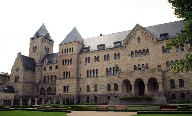 Polska